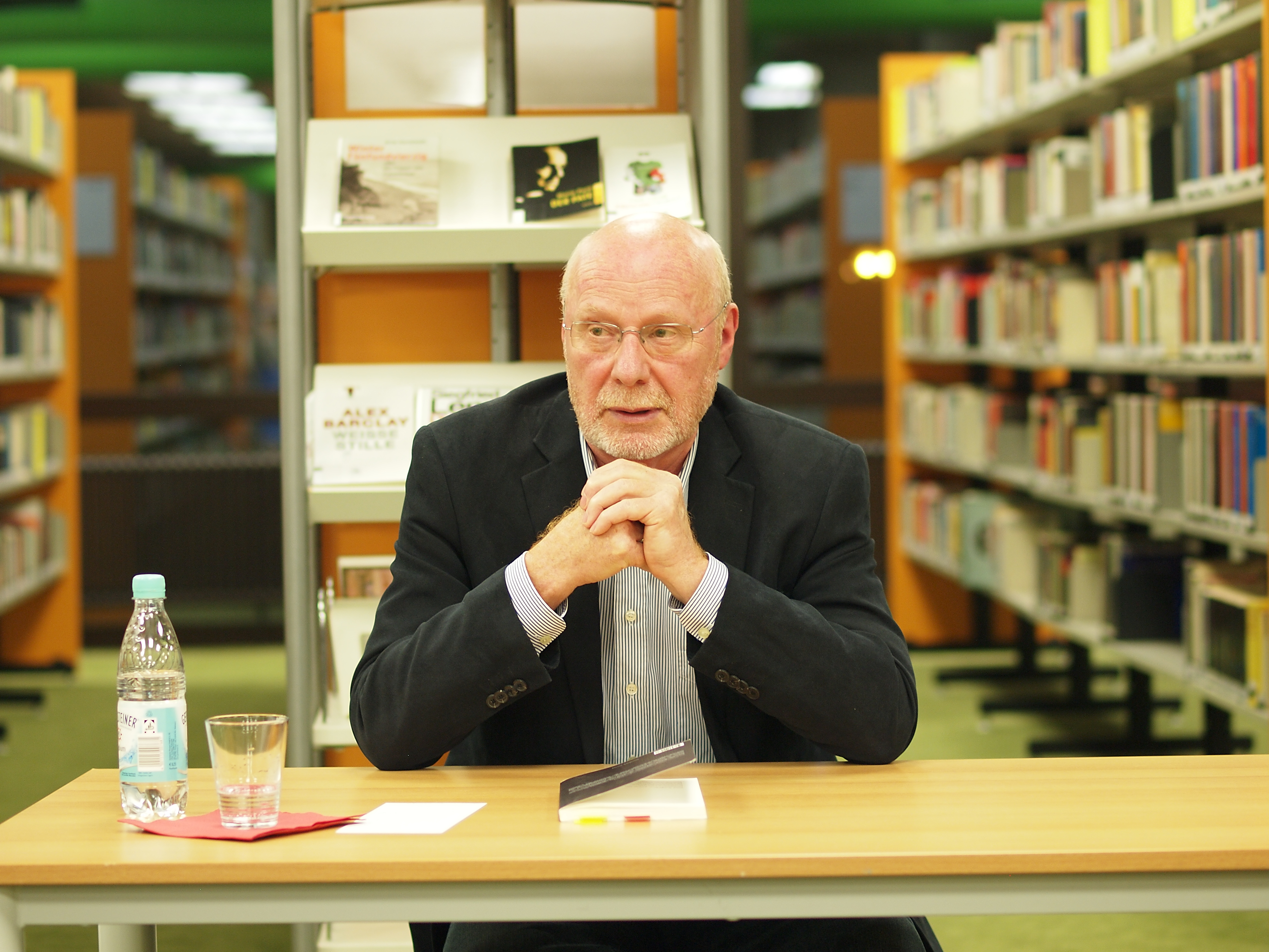 Der Schriftsteller Volker W. Degener anlässlich einer Lesung aus seinem Buch Ein besonderes Kaliber in der Stadtbücherei Bochum